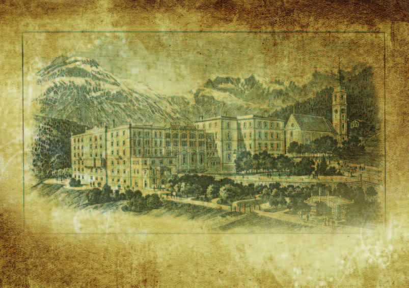 Hotelansicht um die Jahrtausenwende